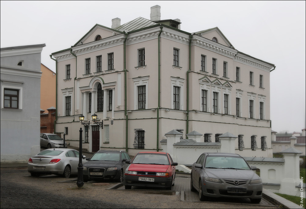 Дом масоноў